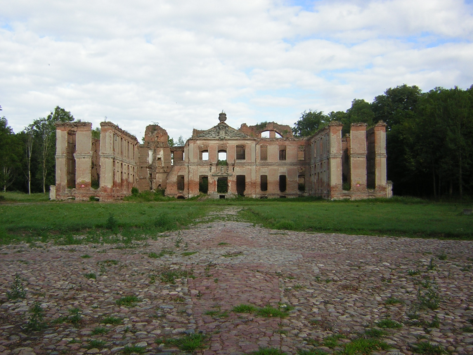 Pałac w Kamieńcu, w powiecie Iławskim